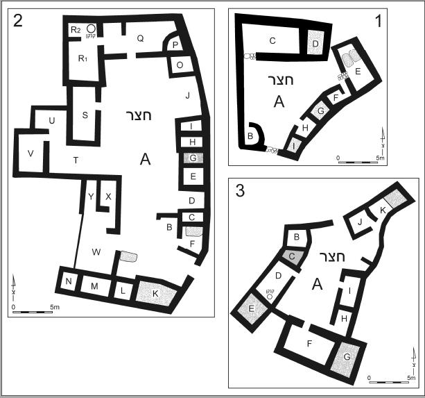 The Yarmukian Culture is a Neolithic culture of the ancient Levant. It was the first culture in Prehistoric Israel and one of the oldest in the Levant to make use of pottery. The Yarmukian derives its name from the Yarmouk River which flows near its type site at Sha'ar HaGolan, a kibbutz at the foot of the Golan Heights. The pictures are fromYosef Garfinkel excavations taken between 1989-1990 & 1998-2004 התרבות הירמוכית היא תרבות מהתקופה הניאוליתית הקרמית שמרבית שרידיה נתגלו באיזור שדות שער הגולן, והיא קיבלה את שמה על שם נהר הירמוך הזורם בסמוך. התמונת הן מחפירות שנערכו בשער הגולן על ידי הארכאולוגי יוסי גרפינקל מהאוניברסיטה העברית . נערכו 2 עונות חפירה 1990-1989, ו 1996-2004. Courtyard buildings מבנים עם חצר פנימית